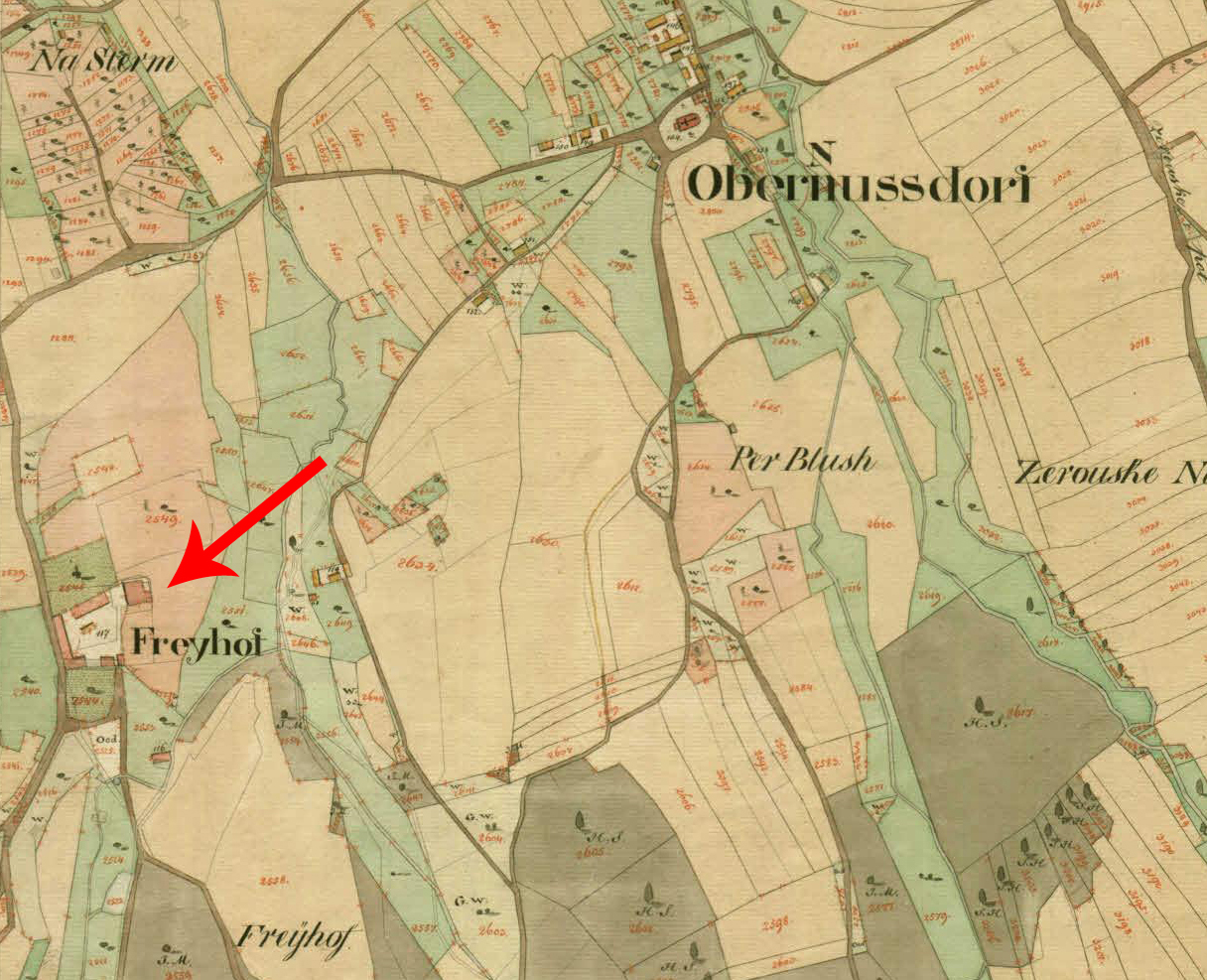 Franciscejski kataster za Kranjsko, 1823-1869